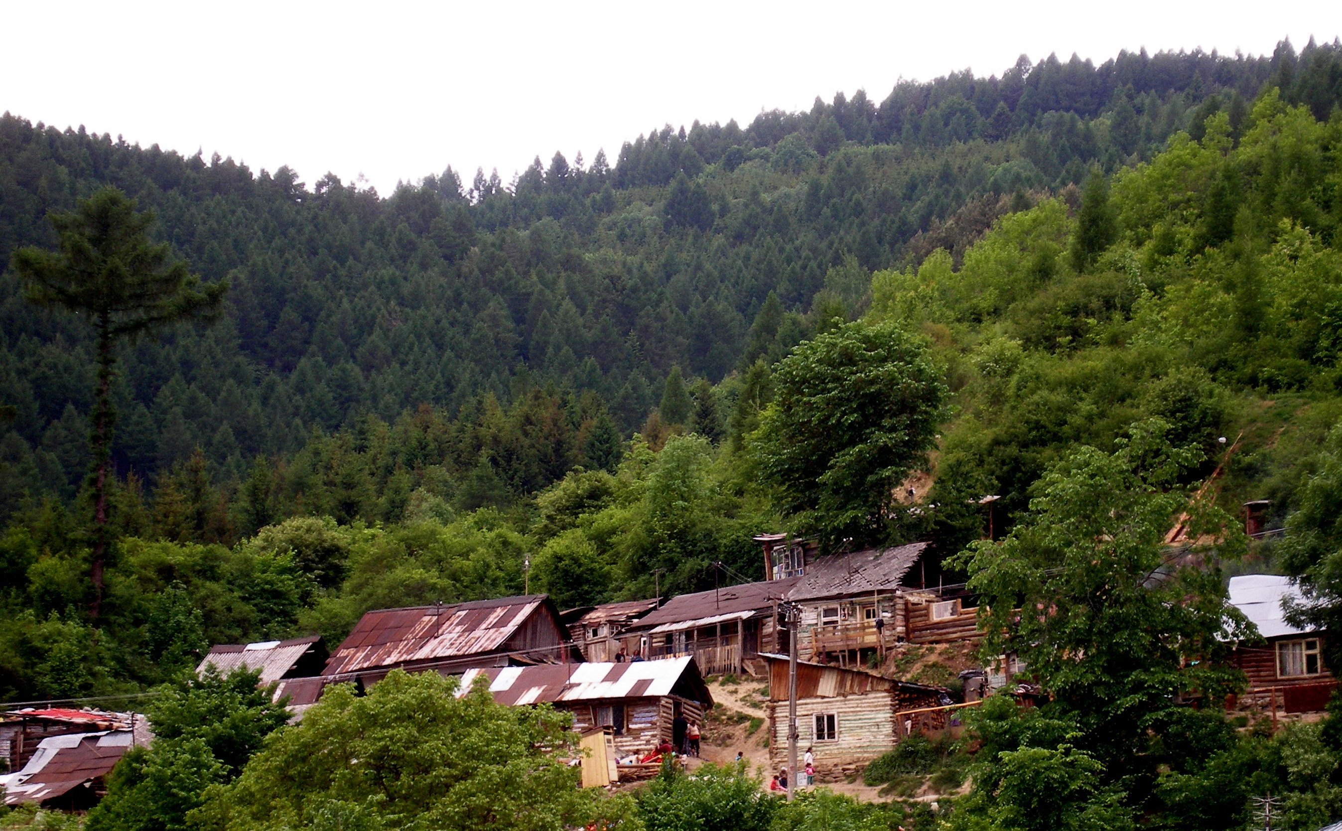 Obec Nižný Slavkov okres Sabinov.